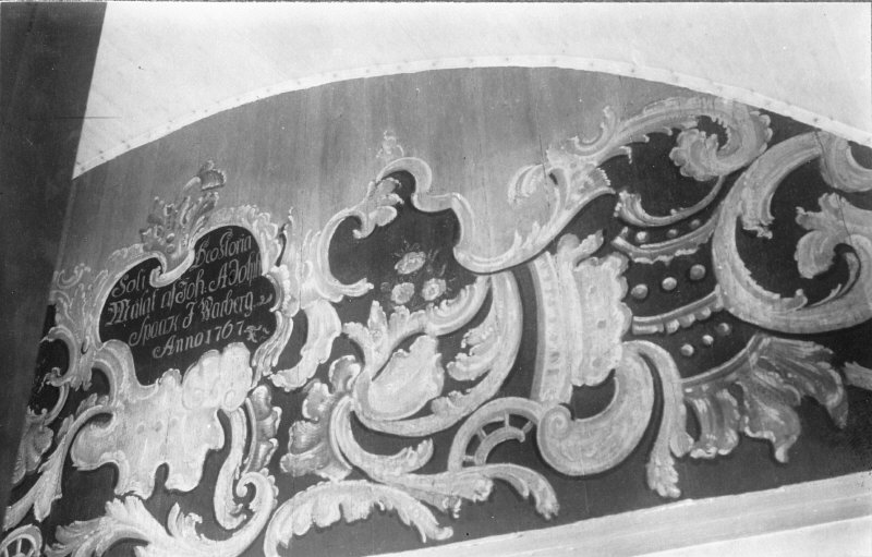 Takmålning, långhuset. Takparti åt väster. Efter behandling. Kategori: (03) Målningar på trä Takmålning, långhuset. Takparti åt väster. Efter behandling.